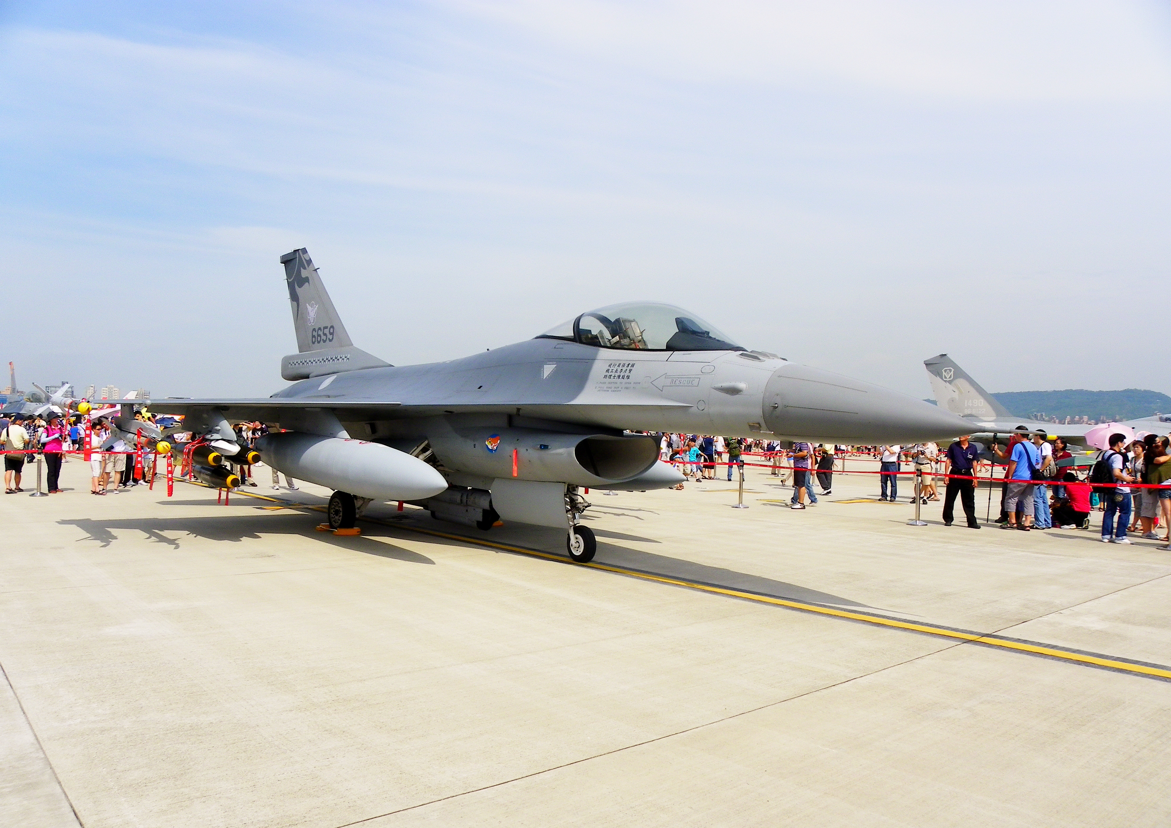 2011年8月13日空軍松山基地公開活動中展示的401聯隊F-16A戰鬥機。